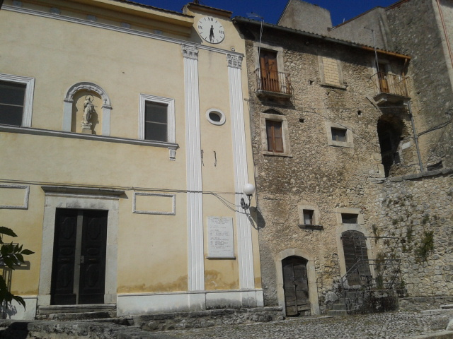 Abbazia di Santa Maria Assunta